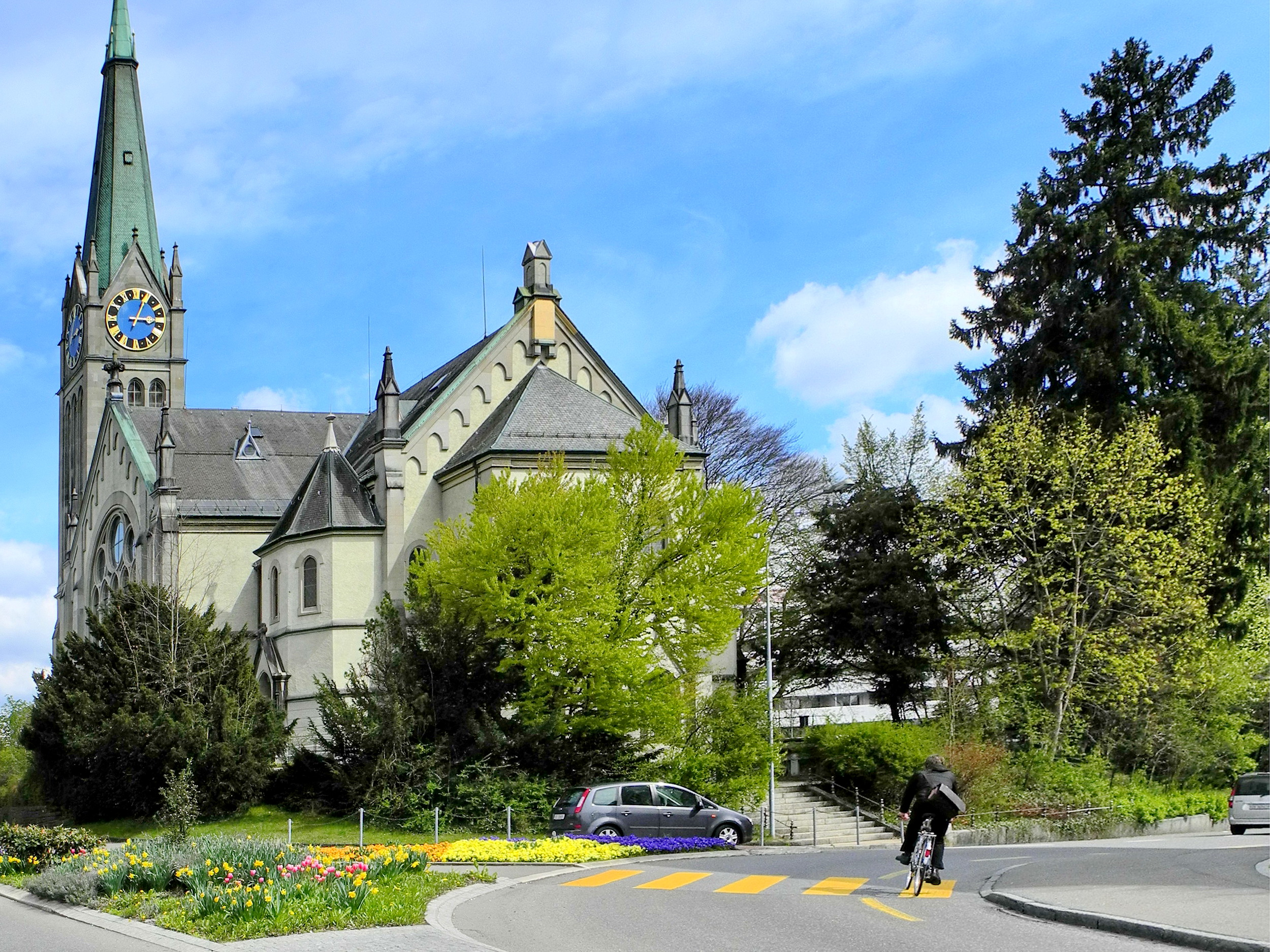 Reformierte Kirche in Wetzikon (Switzerland)